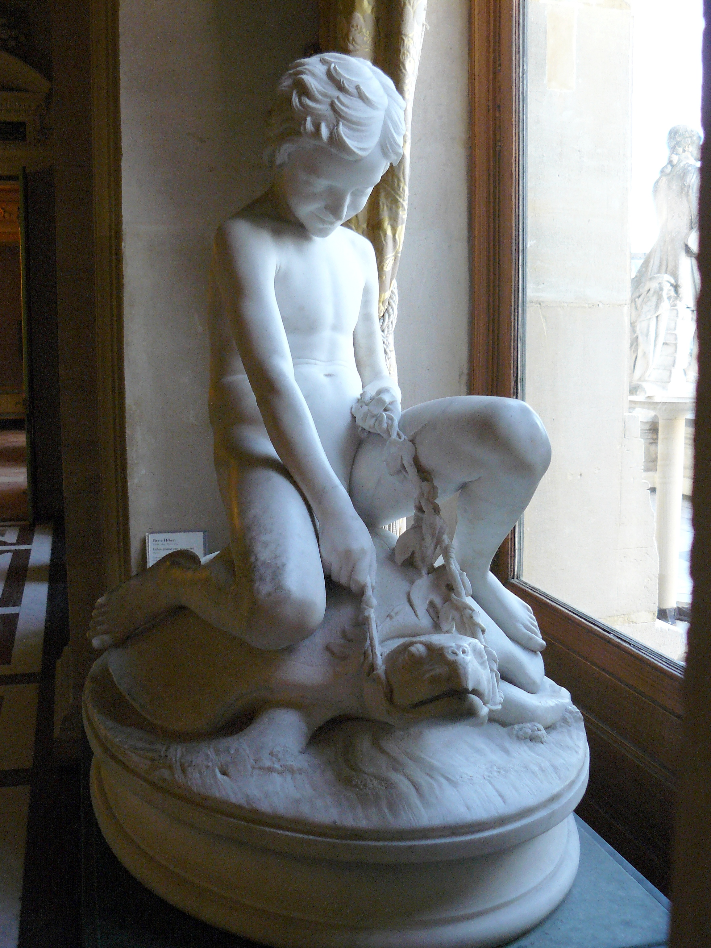 Commandé par le ministère d'État pour la cour du Louvre en 1849, ce marbre, exposé en 1868 au musée du Luxembourg, est catalogué dès 1863 dans l'escalier du ministère au Louvre. Il est resté dans les lieux, affecté au ministère d'État, au ministère des finances et enfin au Musée du Louvre. (Cartel d'exposition)